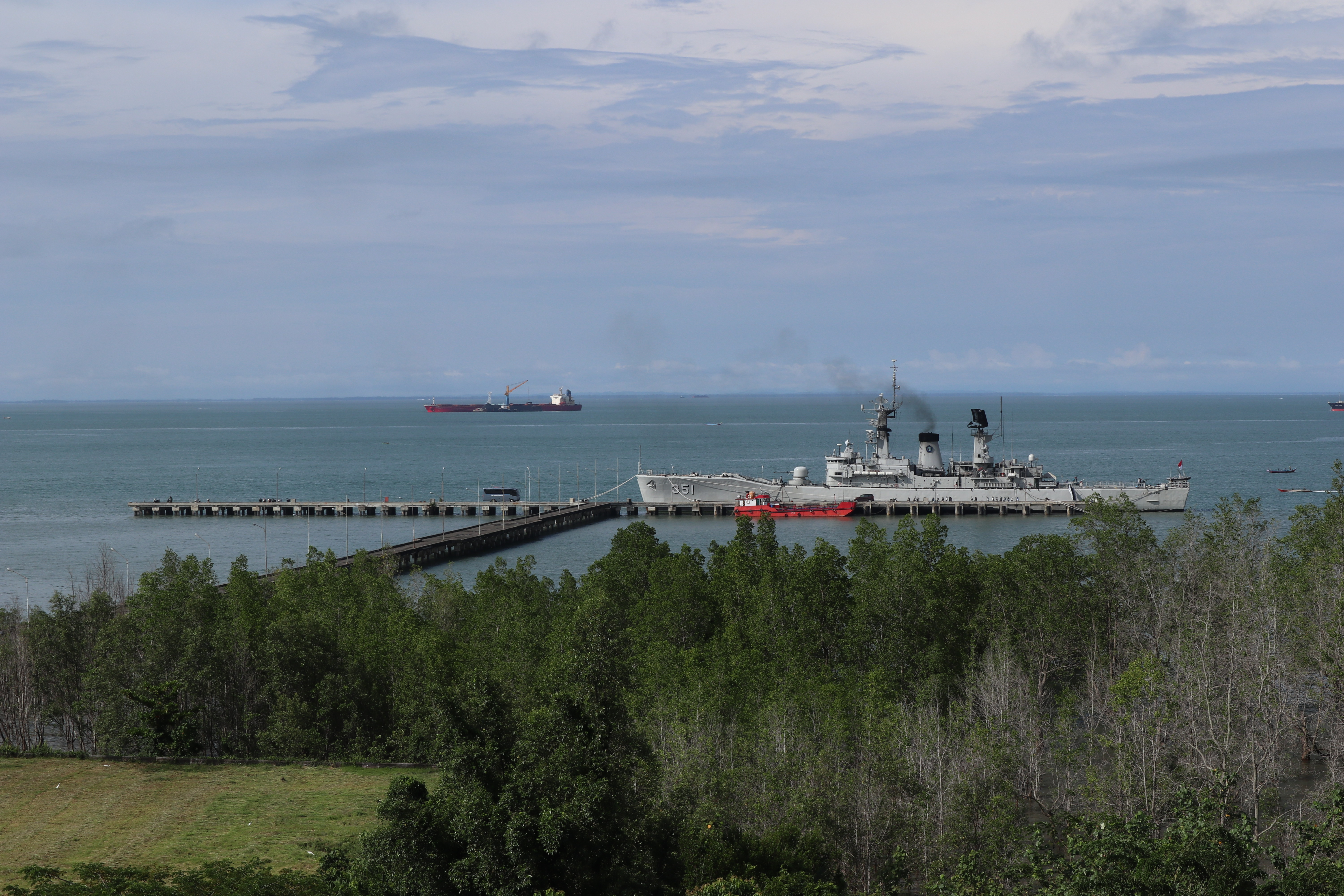 Dermaga Pangkalan Utama TNI Angkatan Laut (Lantamal) XIII Tarakan di Mamburungan.